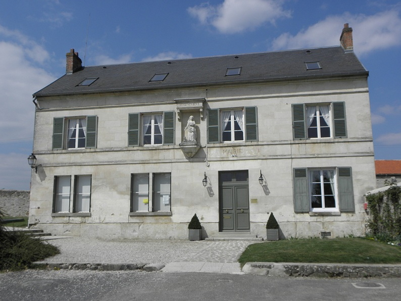 Mairie de Marolles (60).